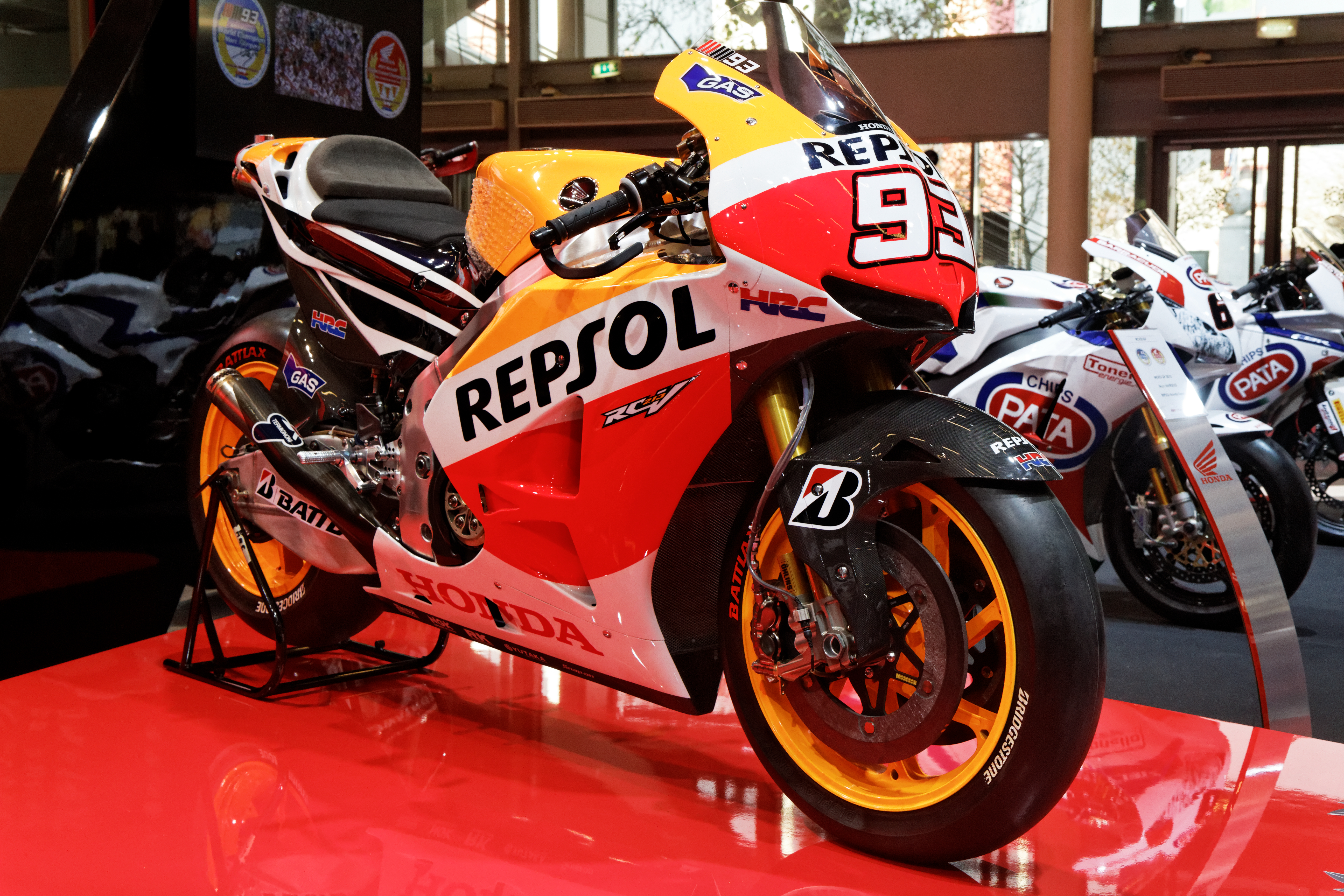 La Honda GP 2013 de Marc Márquez présentée lors du salon de la moto 2013.